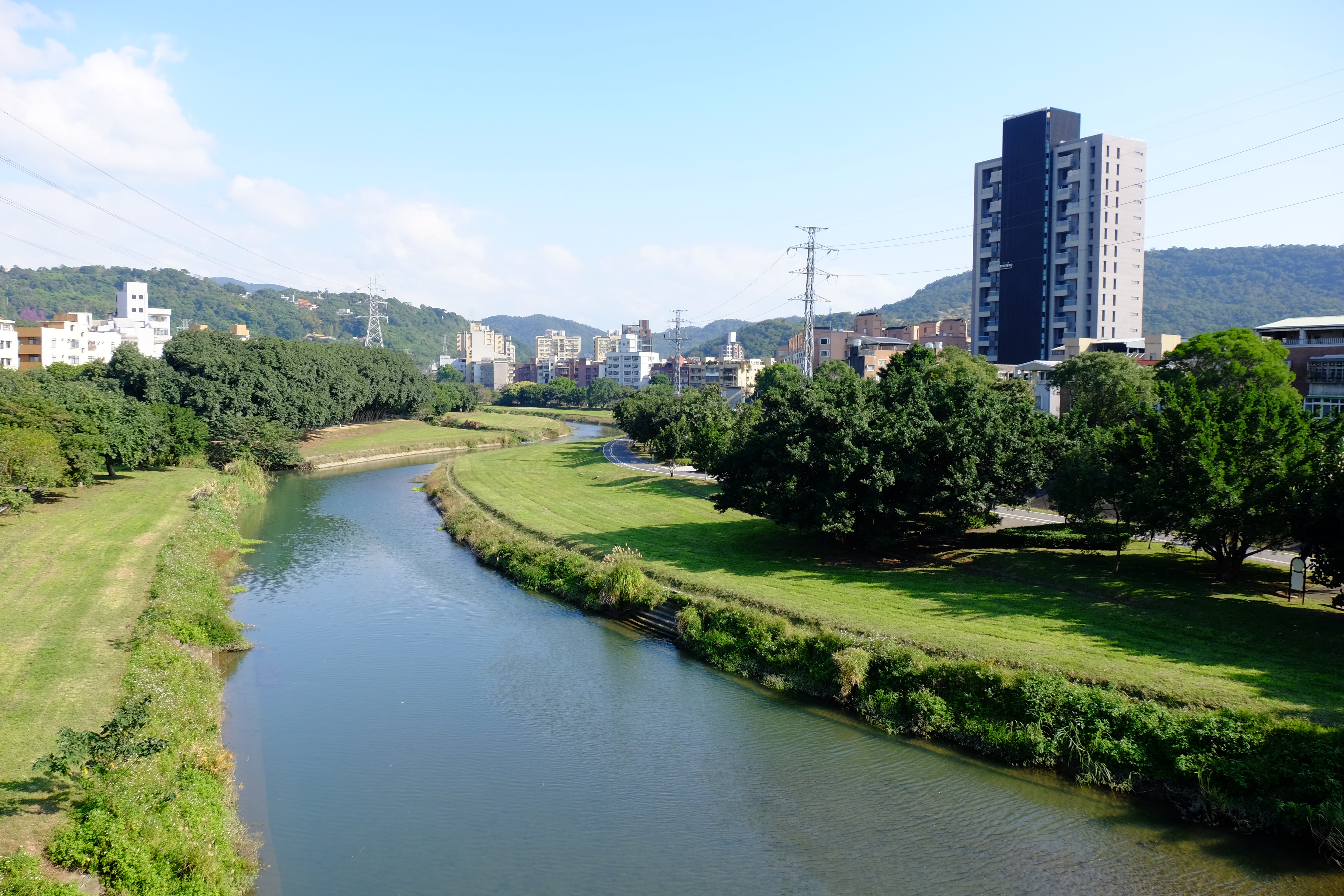 從福林橋東側北端東望外雙溪與雙溪河濱公園。